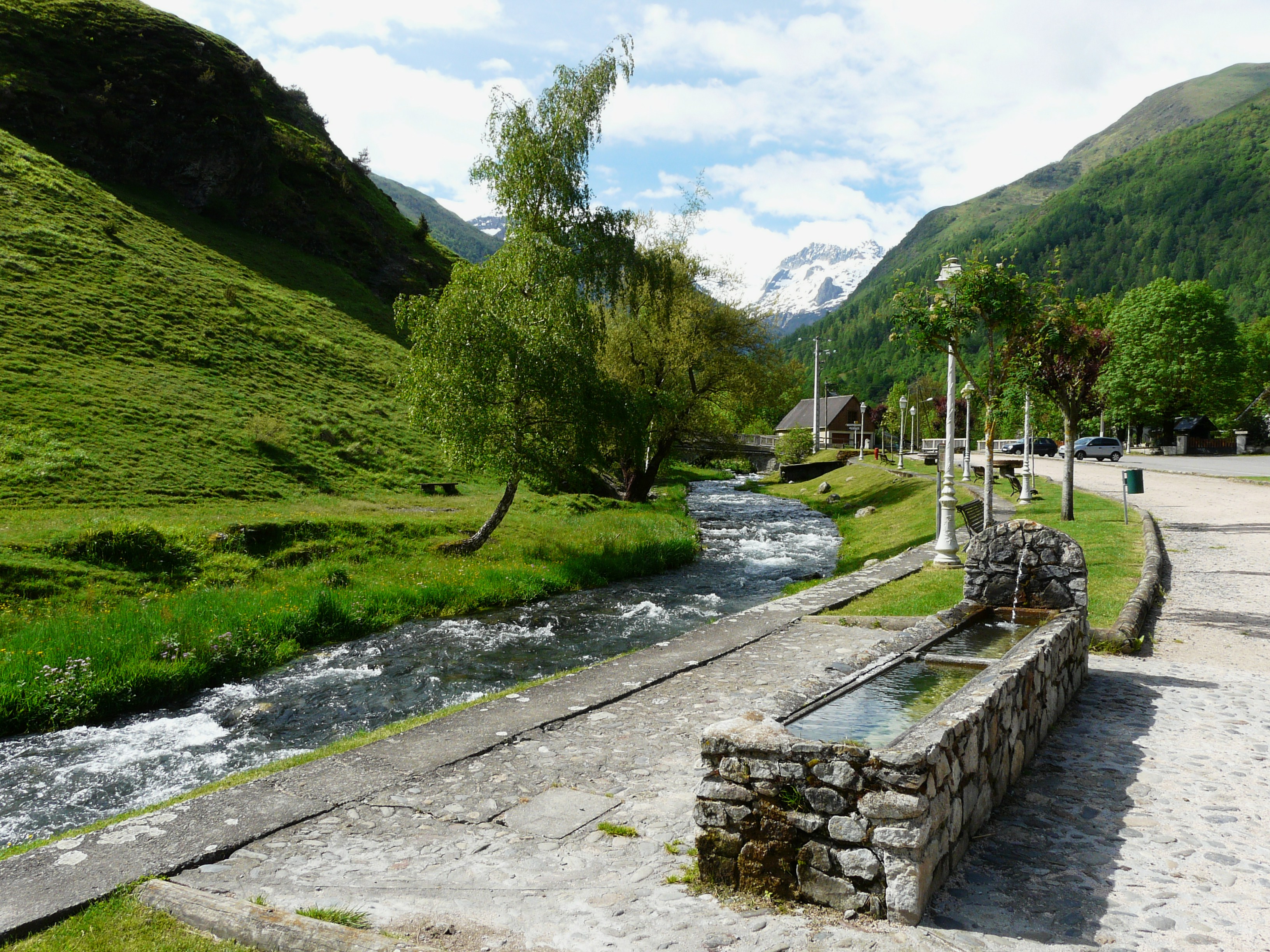 La Neste d'Oô dans le village d'Oô, Haute-Garonne, France.